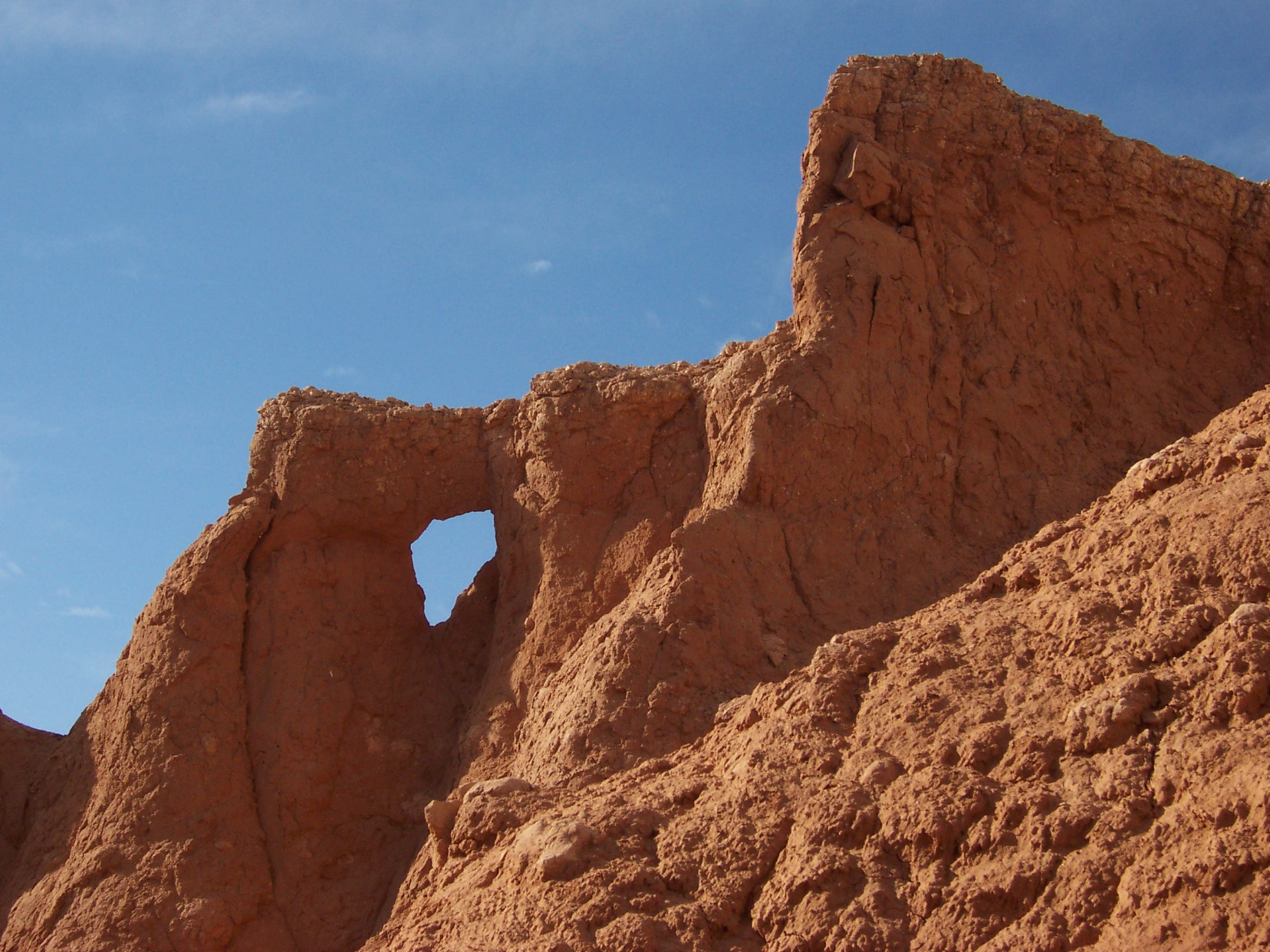 Site de Bayanzag en Mongolie.